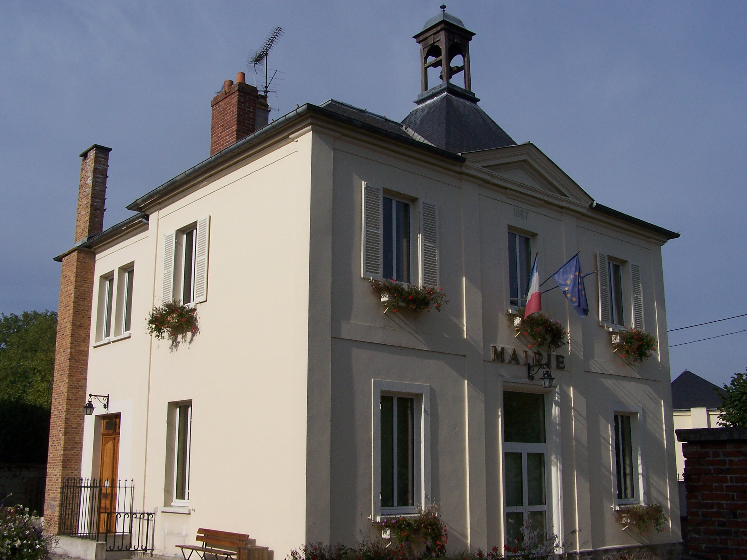 Mairie de Cernay-la-Ville (Yvelines, France)